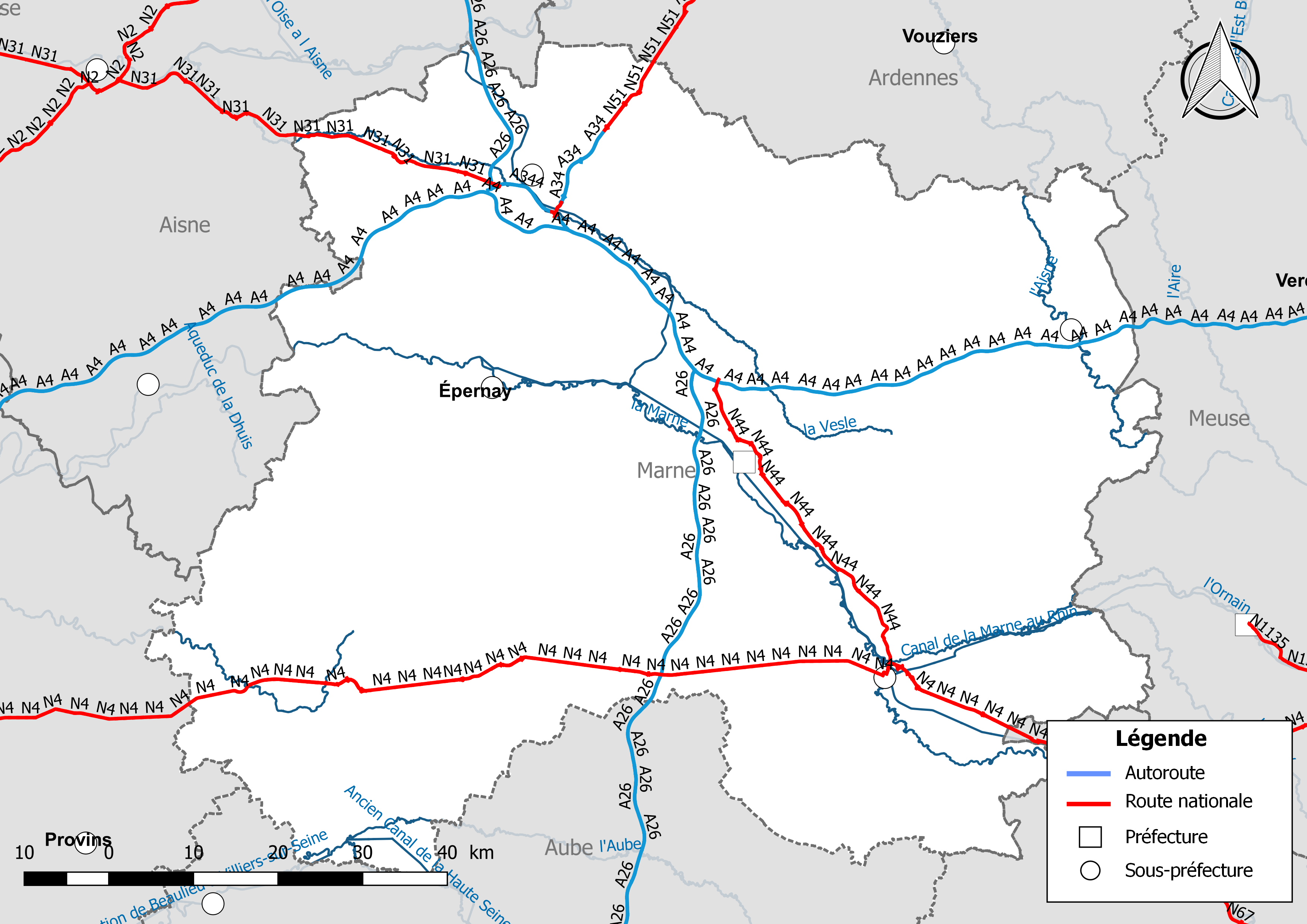 Carte du réseau routier national, constitué des autoroutes et des routes nationales, dans le département de la Marne (France). Situation au 1er janvier 2019.